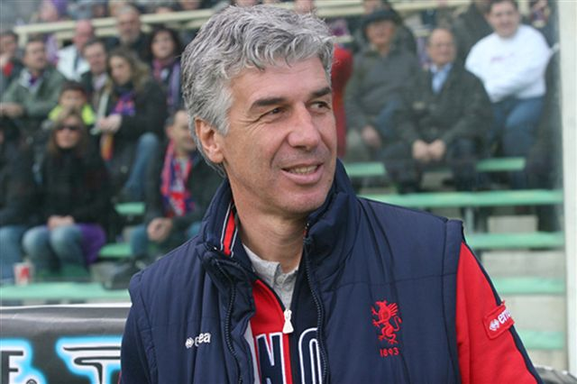 Genoa CFC coach, Gian Piero Gasperini